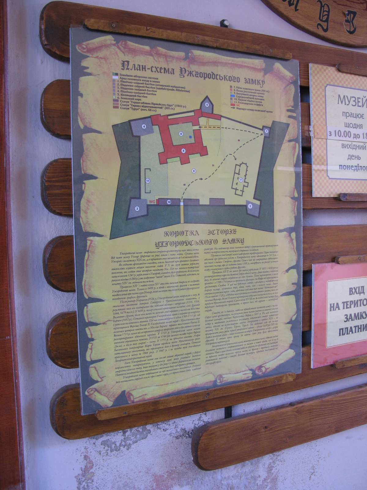 Ужгород. Замок.